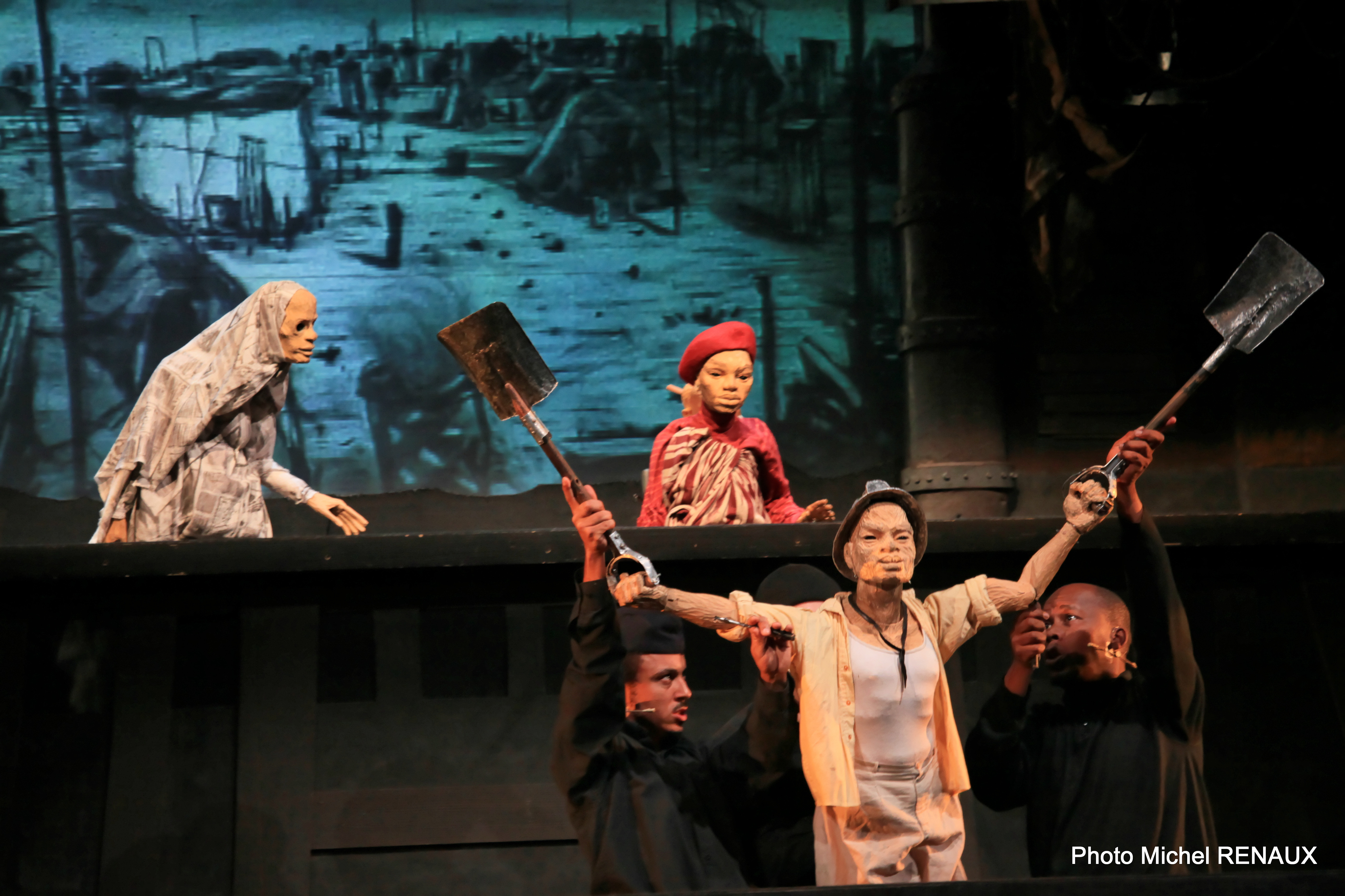 Spectacle lors du Festival mondial des théâtres de marionnettes de 2011.